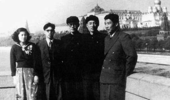 1955或1956年，江泽民(中)与中国实习生和留学生在莫斯科。